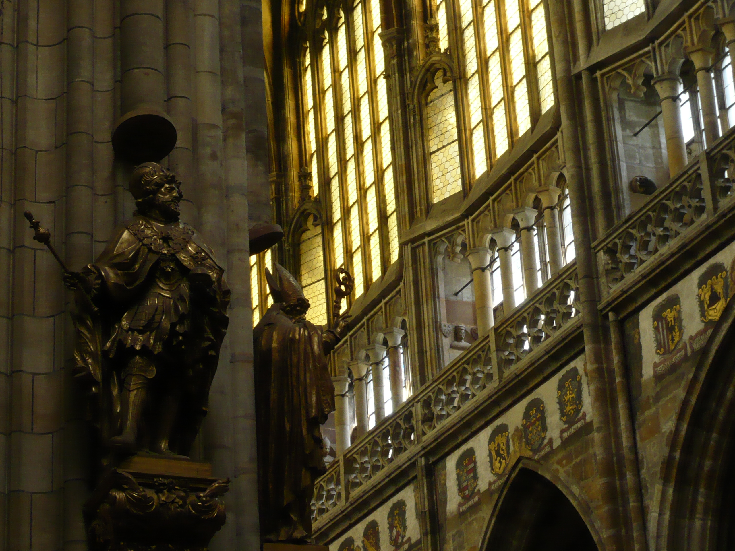 Praha, Katedrála svatého Víta, Václava a Vojtěcha